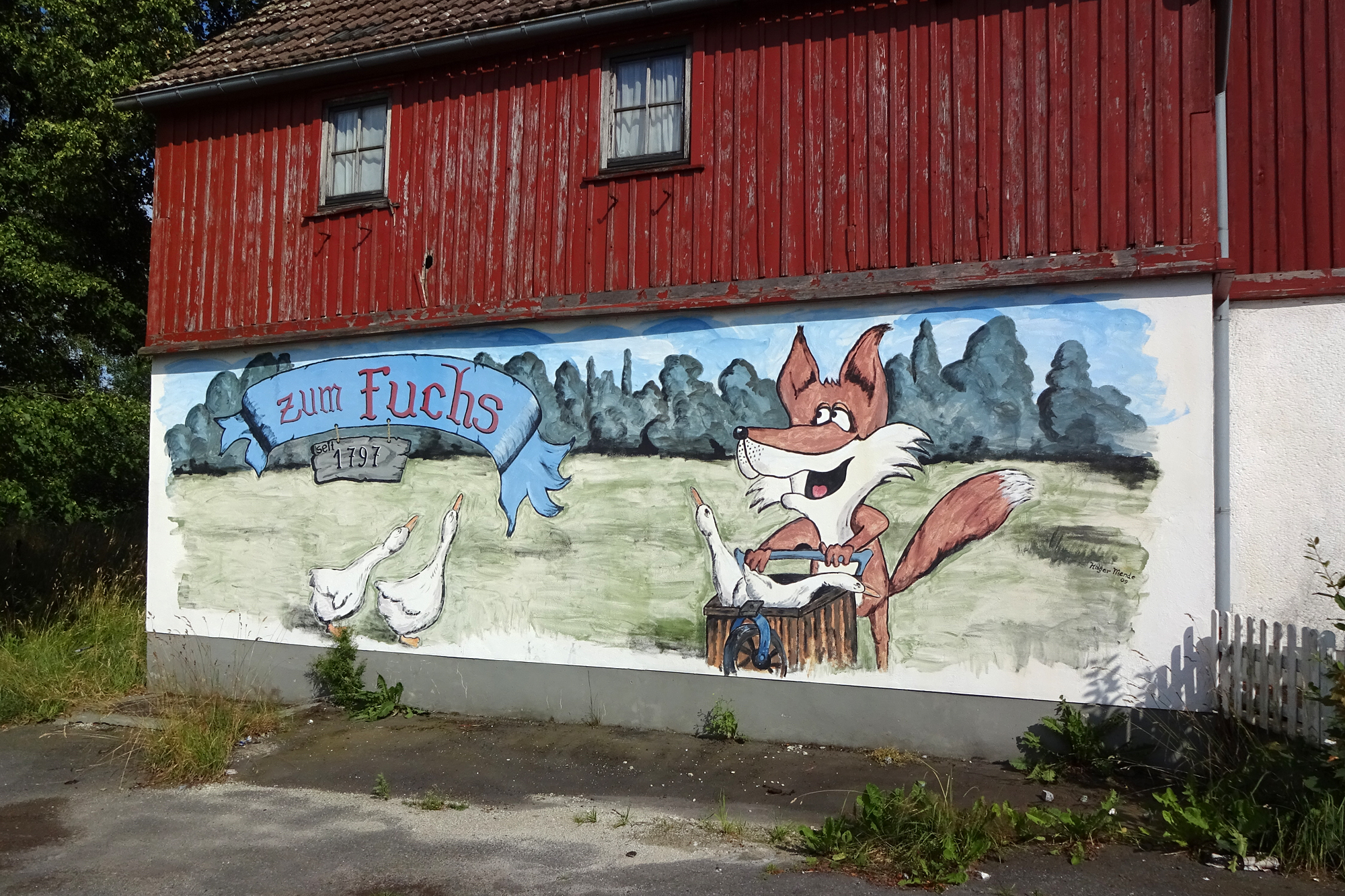 Ehemaliges Gasthaus "Dürrer Fuchs" in Schmiedeberg an der Bundesstraße 6